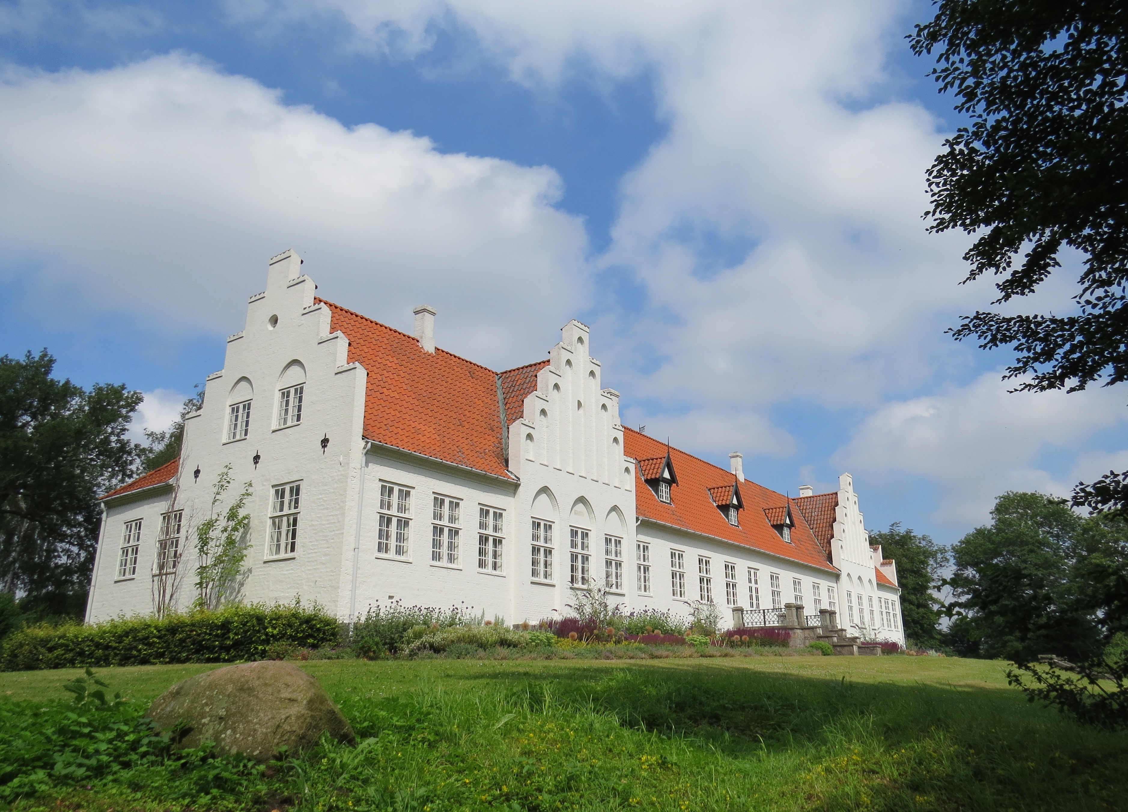 Rønnebæksholm Hovedgård, Sjælland